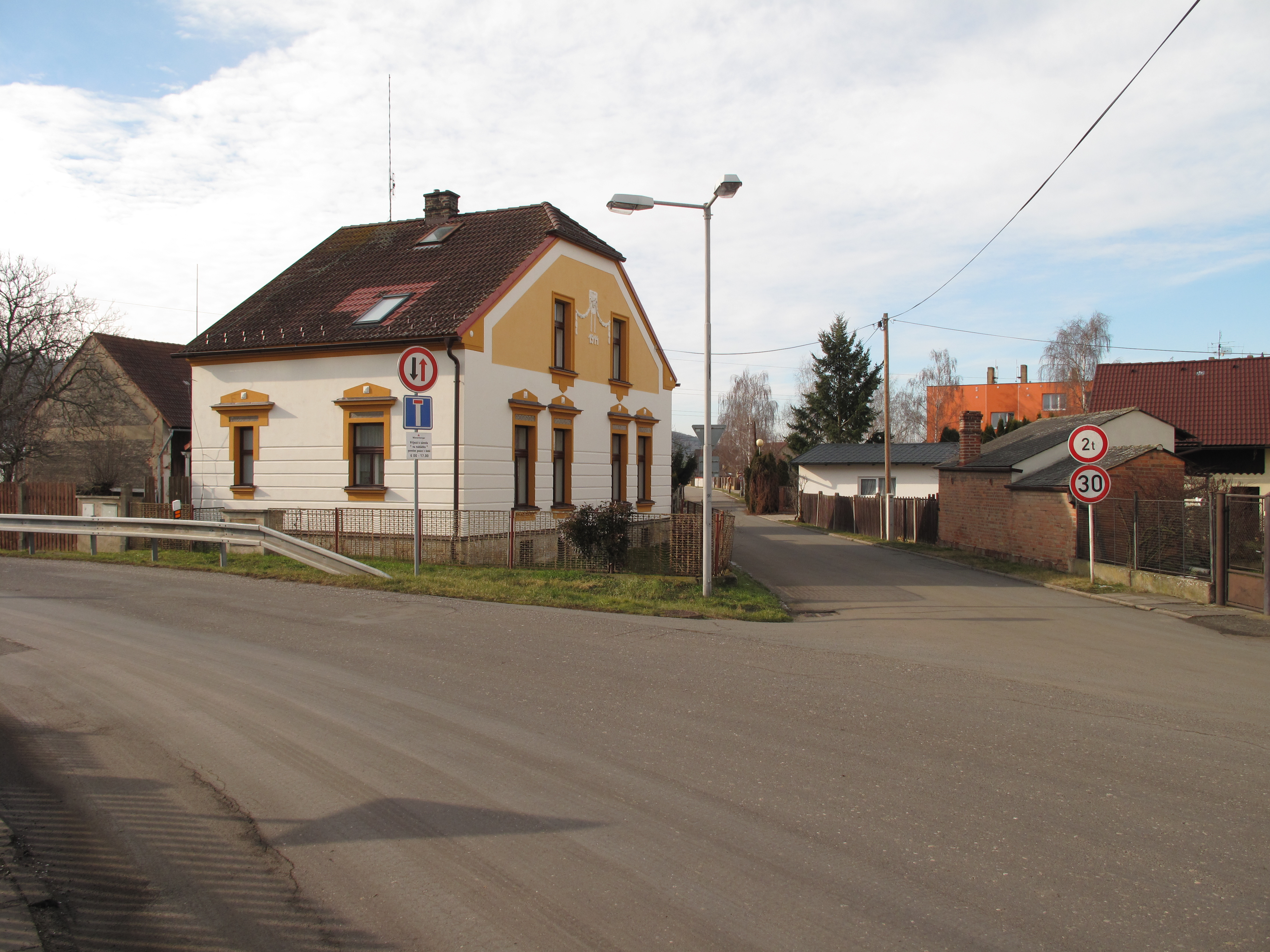 Dům v Řepově. Okres Mladá Boleslav, Česká republika.